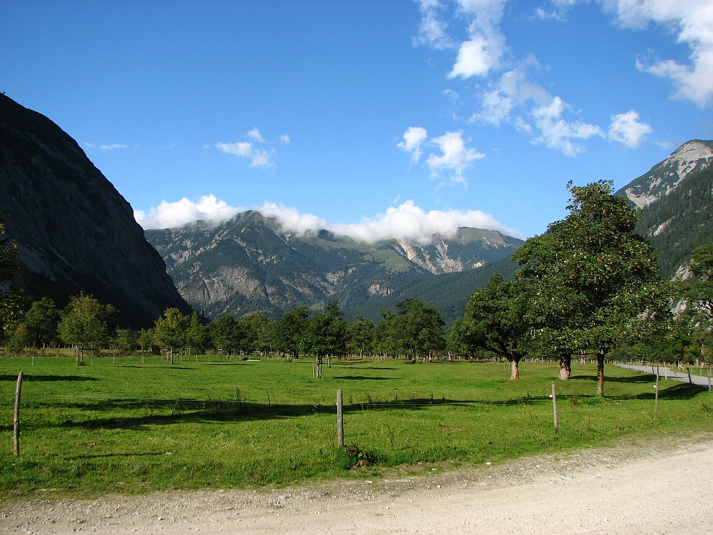 Blick vom Ahornboden zum Kompar